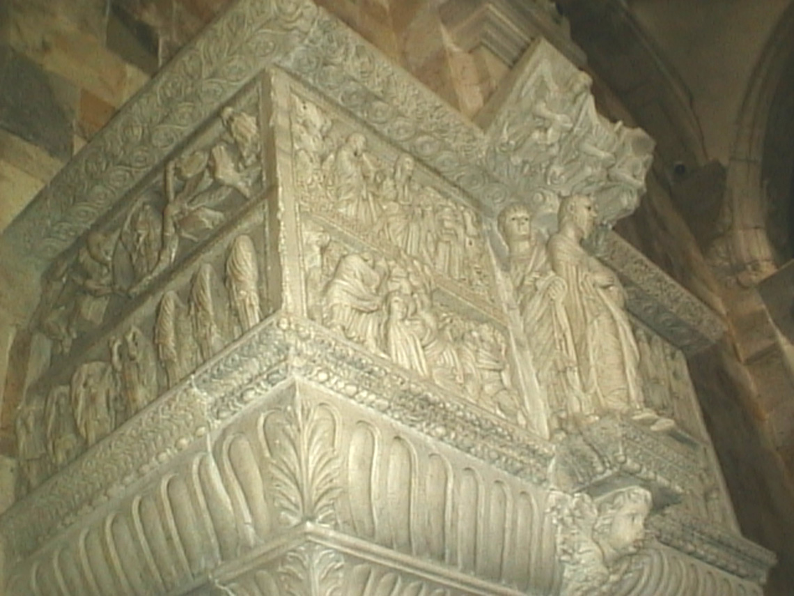 Pulpito di Guglielmo, XII secolo, Cattedrale di Cagliari